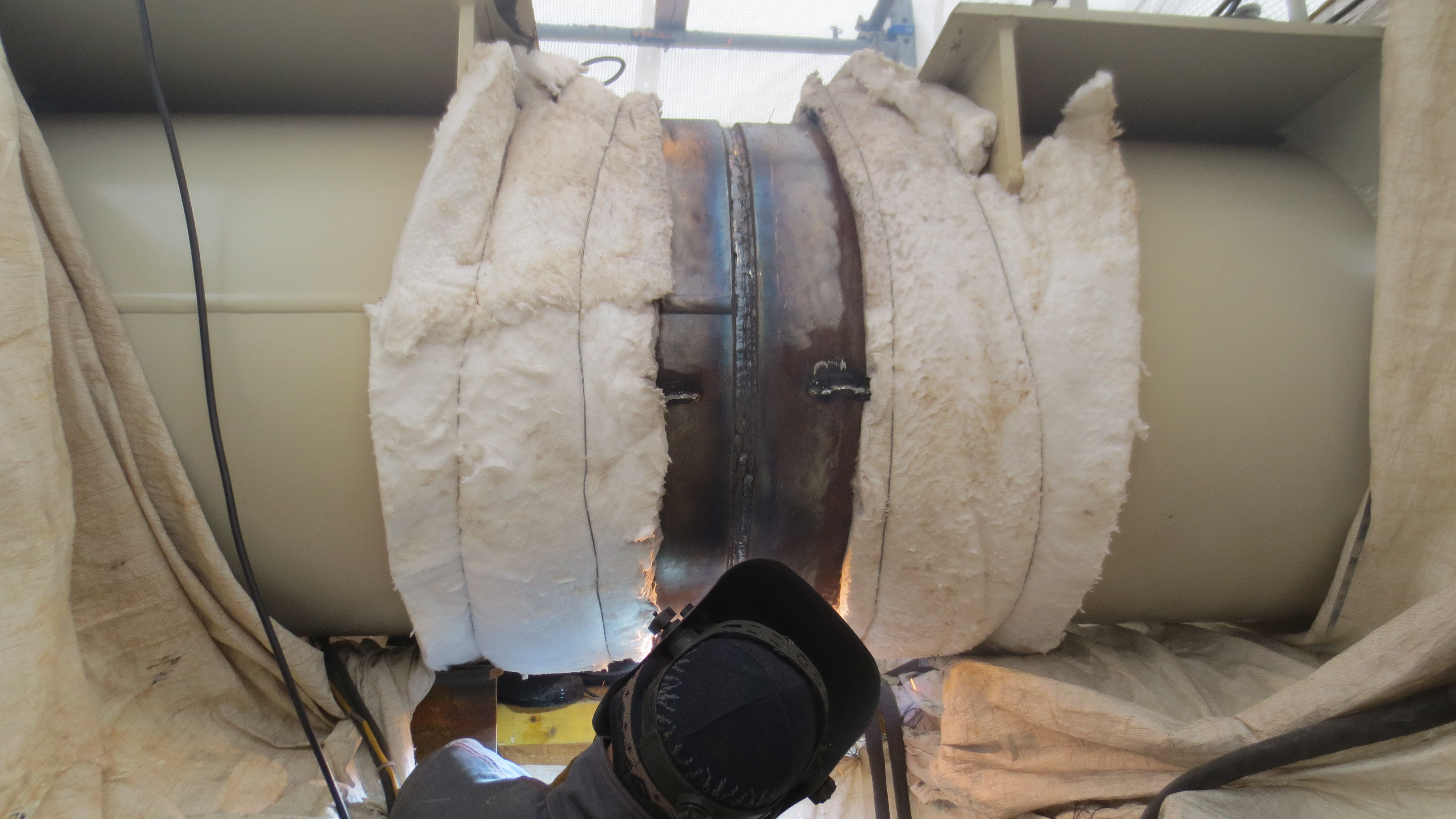 Perdangos konstrukcijų suvirinimas